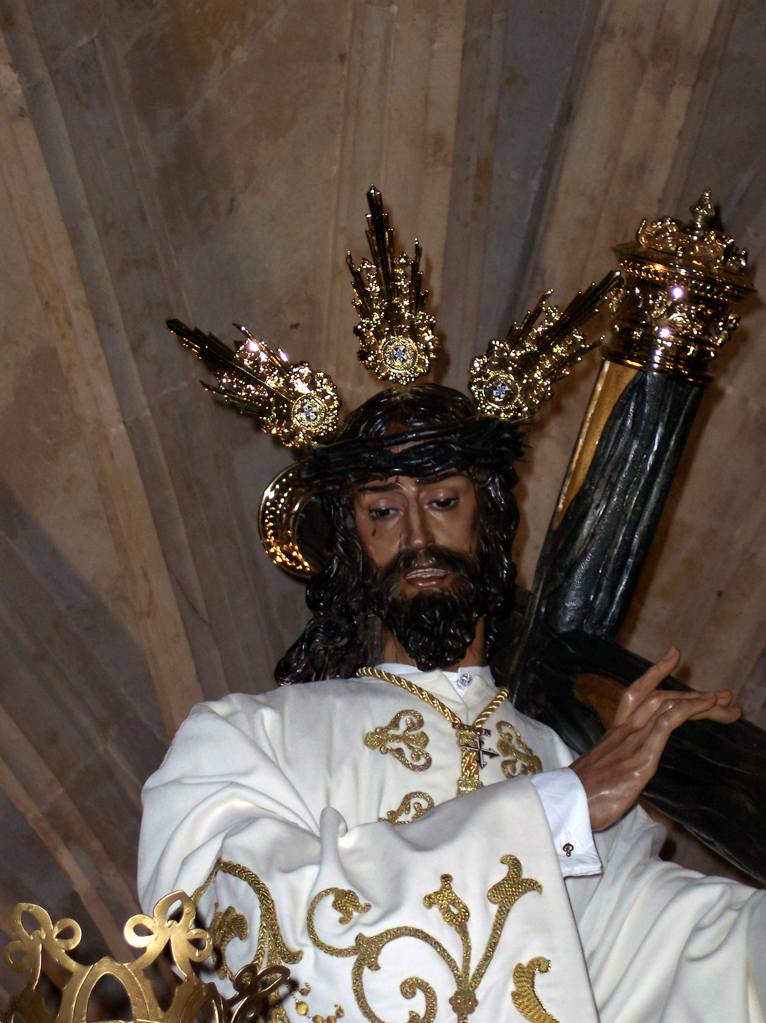 N.P. Jesús de la Pasión. Hermandad Dominicana del Stmo. Cristo de la Buena Muerte. Salamanca (España).